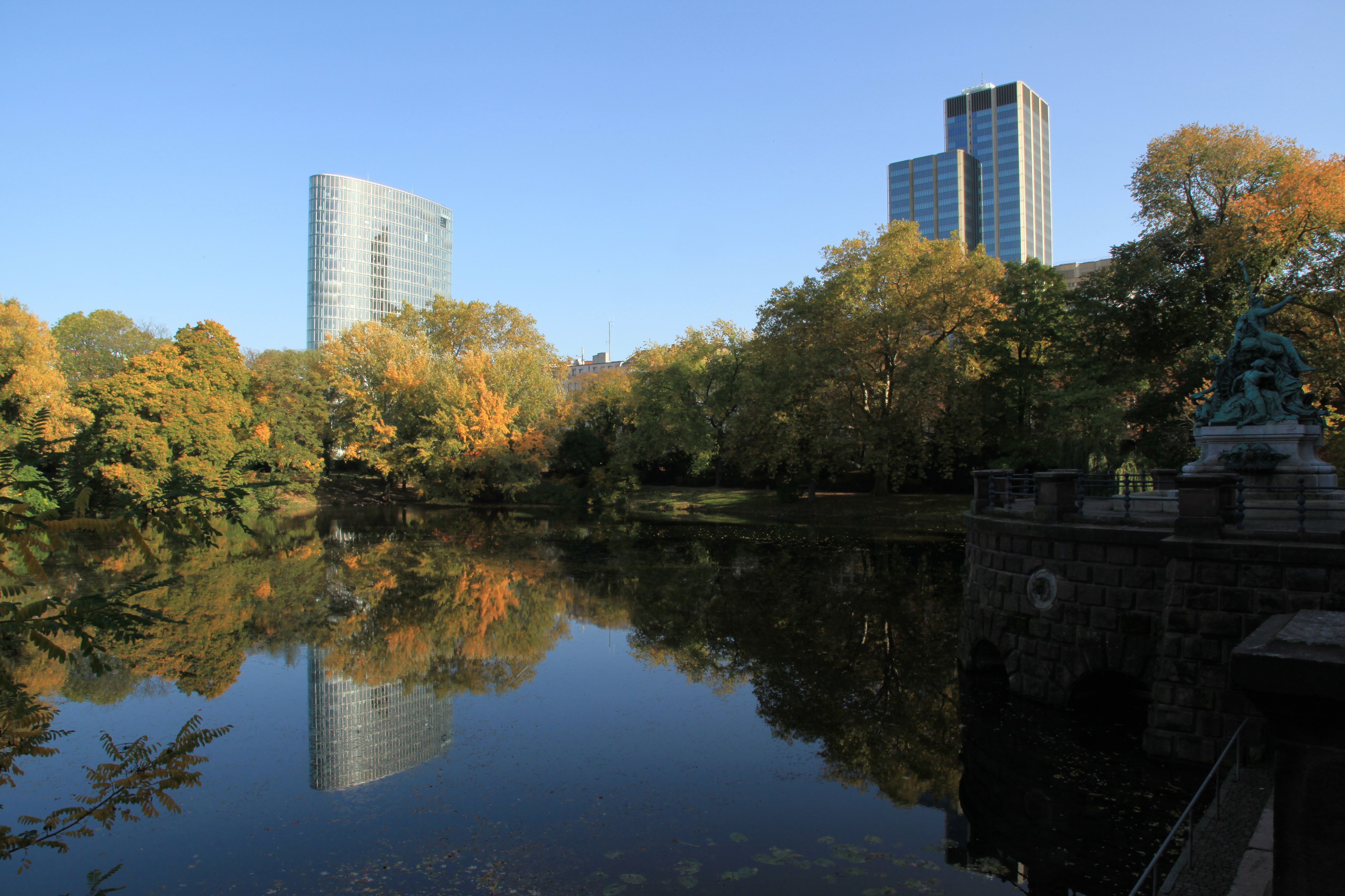 Kaiserteich mit GAP 15 und LVA-Hauptgebäude im Hintergrund in Düsseldorf